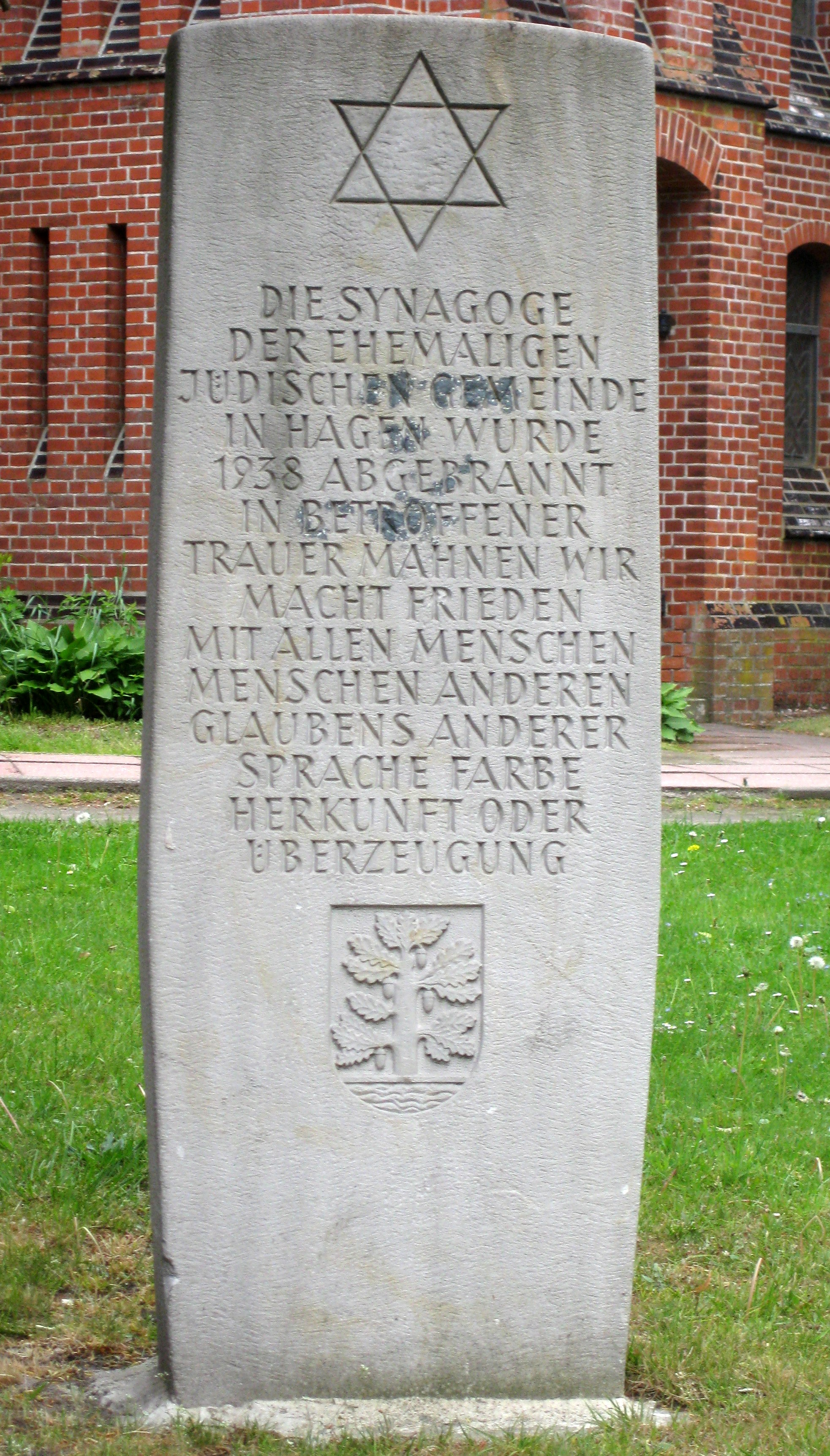 Gedenkstein für die ehemalige Synagoge in Hagen (i.Br.) neben dem Eingang der Martin Luther-Kirche